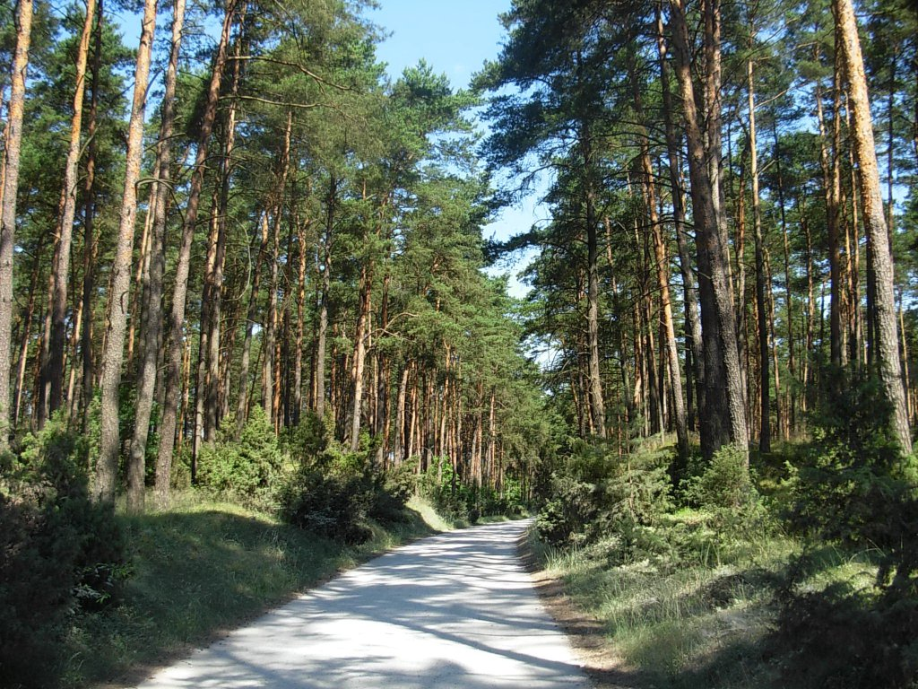 Puszcza Bydgoska, droga z Piecek do Bydgoszczy